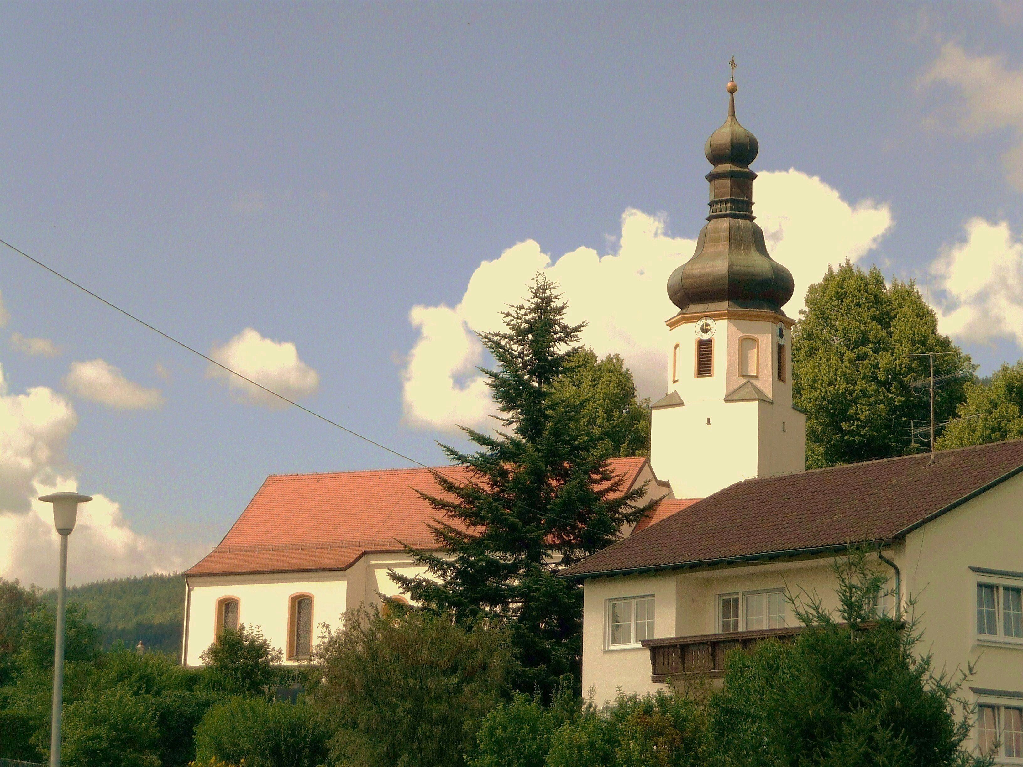 Die Pfingstreiter-Wallfahrtskirche St. Nikolaus in Steinbühl